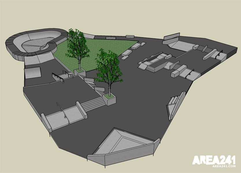 Skateplaza Plauen / 3D Ansicht